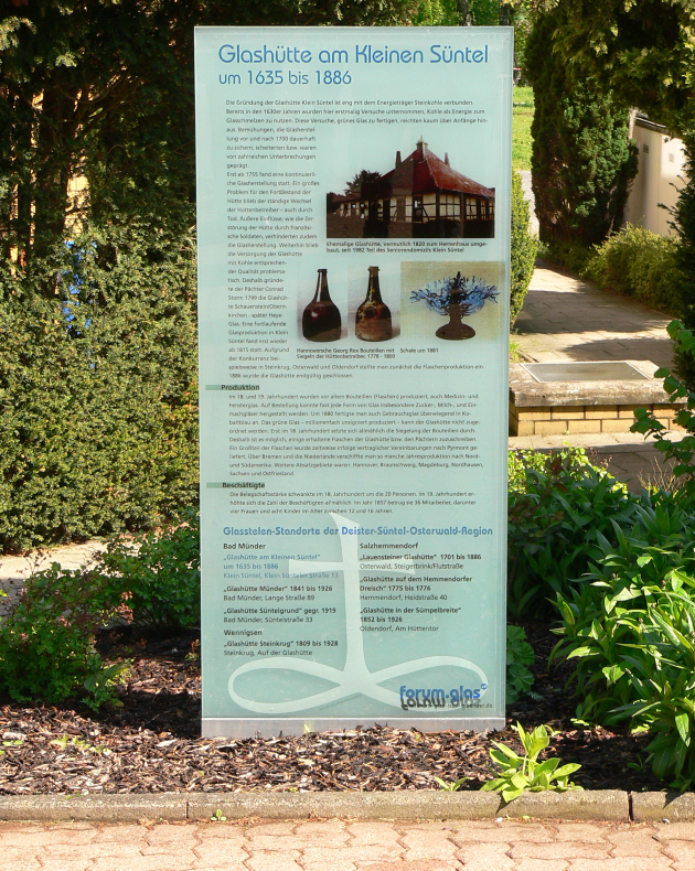 Glasstele an der Glashütte Klein Süntel